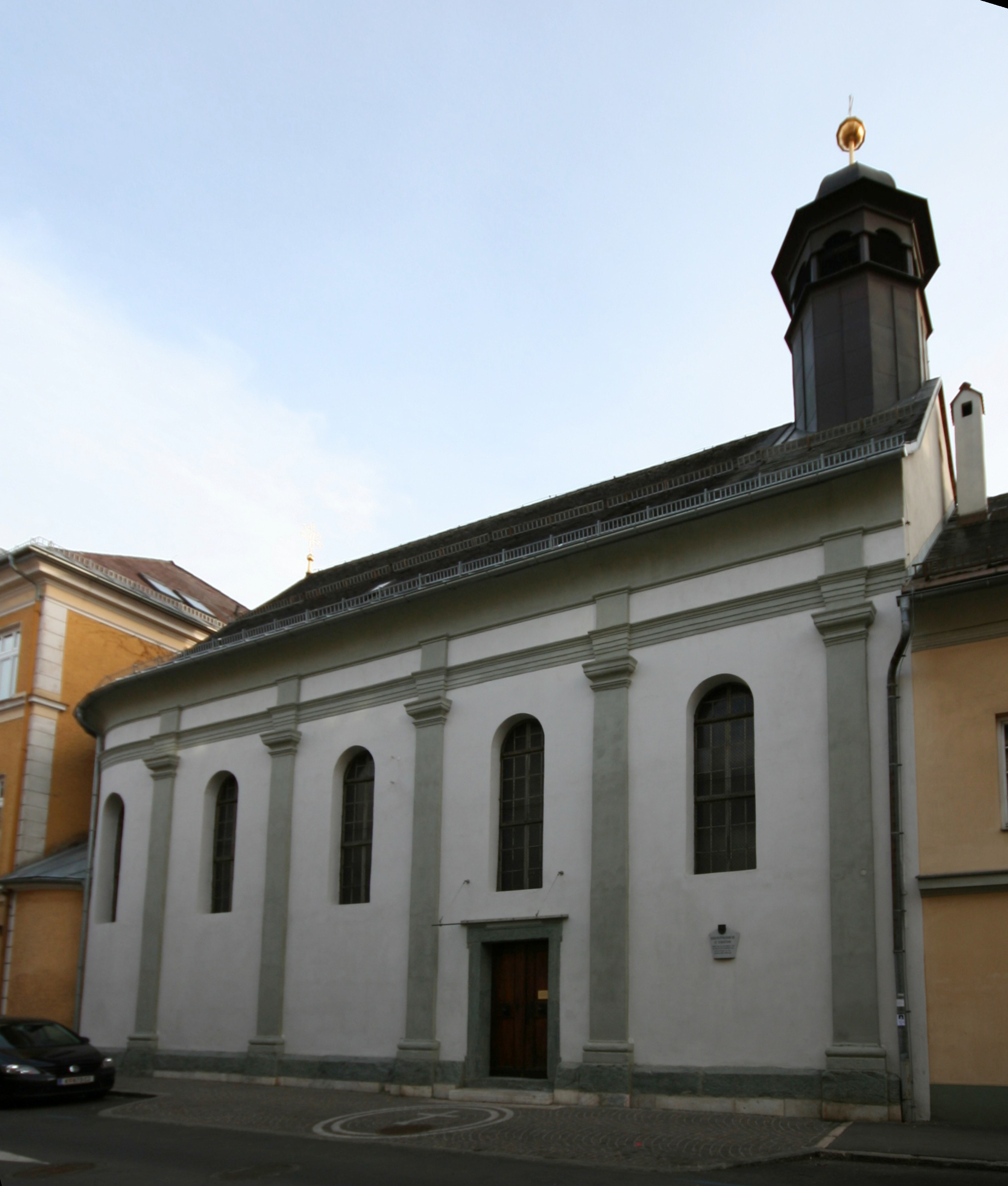 Bürgerspittalskirche, Klagenfurt, Kärnten